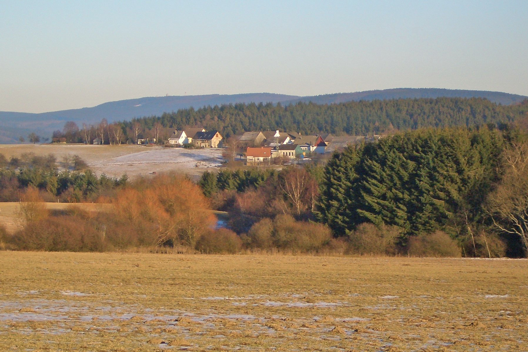 *Sujet:Hinzert-Pölert Source:Eege Foto vum Christoph Lange